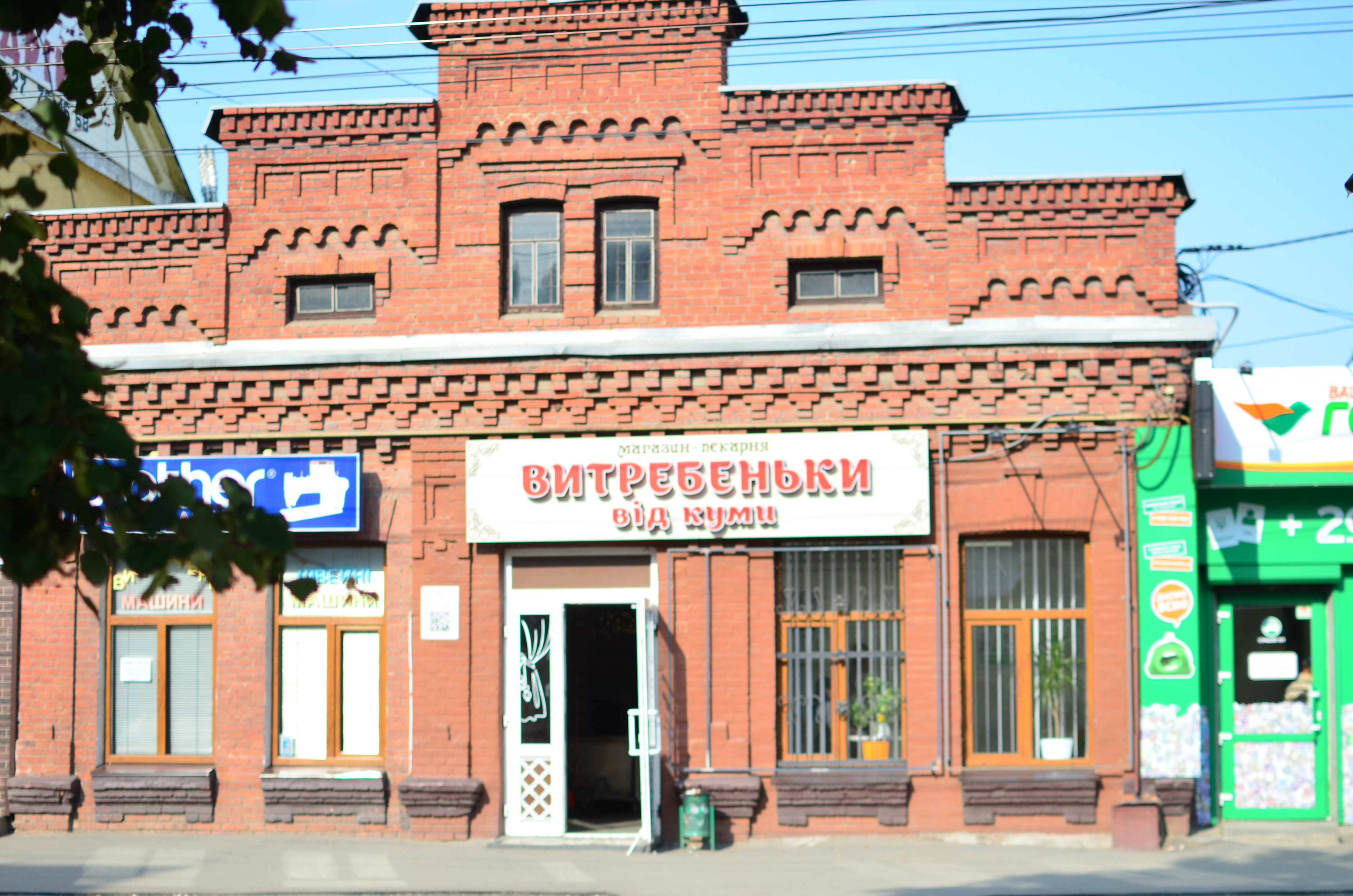 м. Хмельницький, вулиця Кам'янецька, 14.